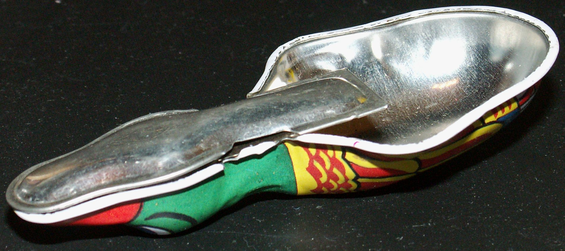 Unterseite einer Knackente aus Blech mit sichtbarem Mechanismus, für den Artikel Spielzeug